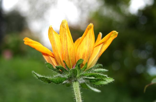 Rudbeckia irta - Località: Limana (BL) 350 m s.l.m.